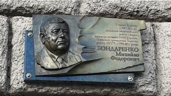 Bondarenkodoska